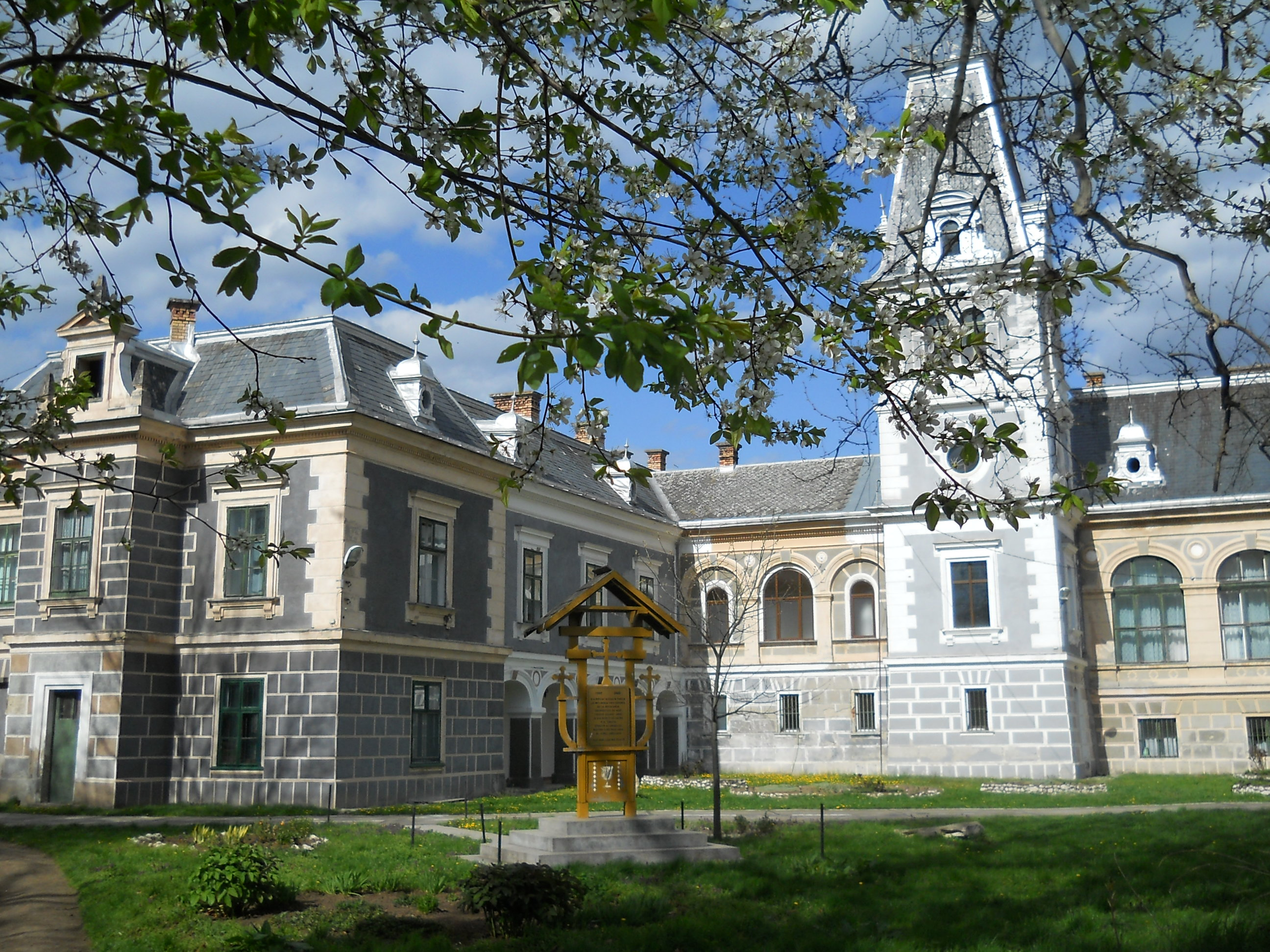 Aripa Karolyi, aripa noua